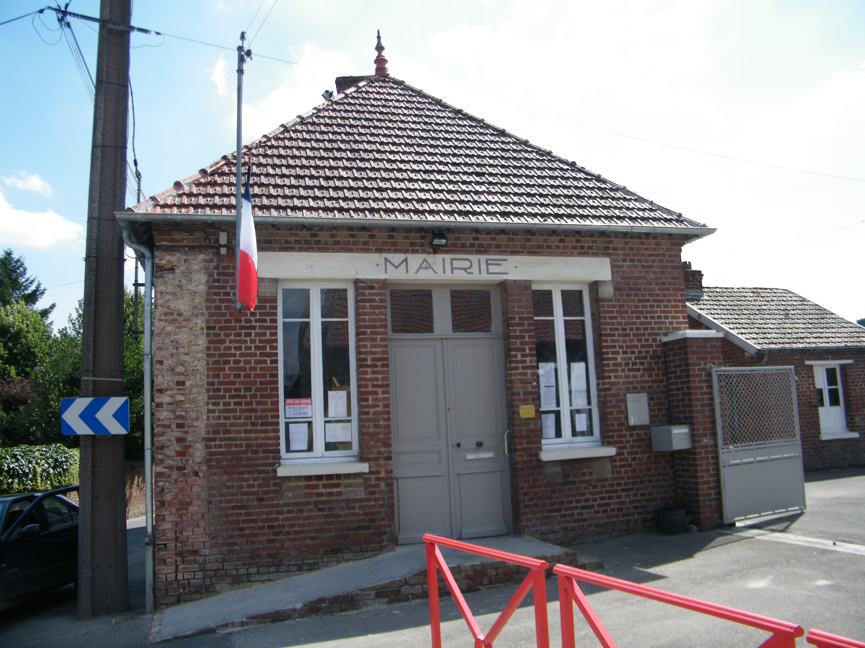 Mairie.